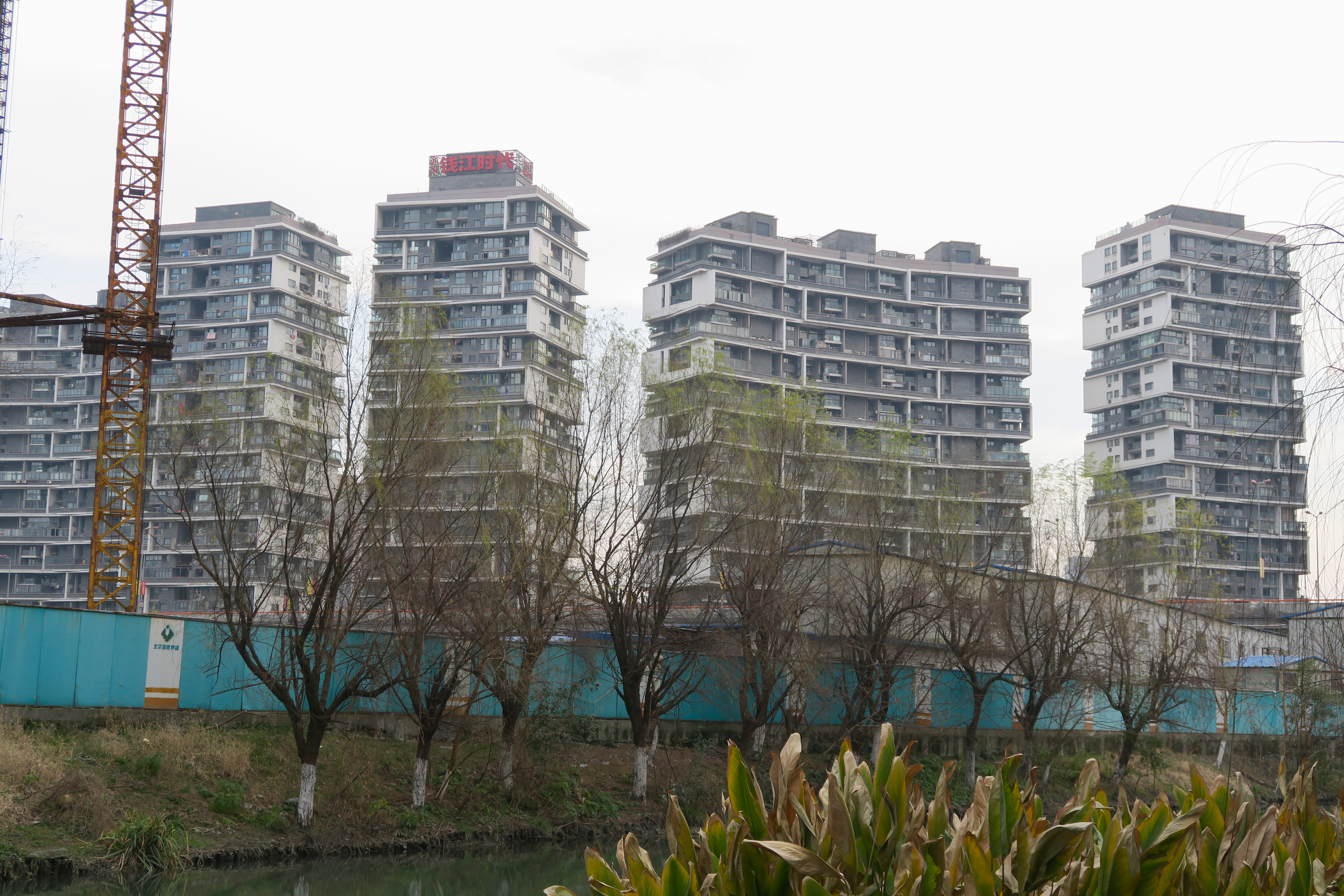 钱江时代公寓——垂直的院落，王澍设计